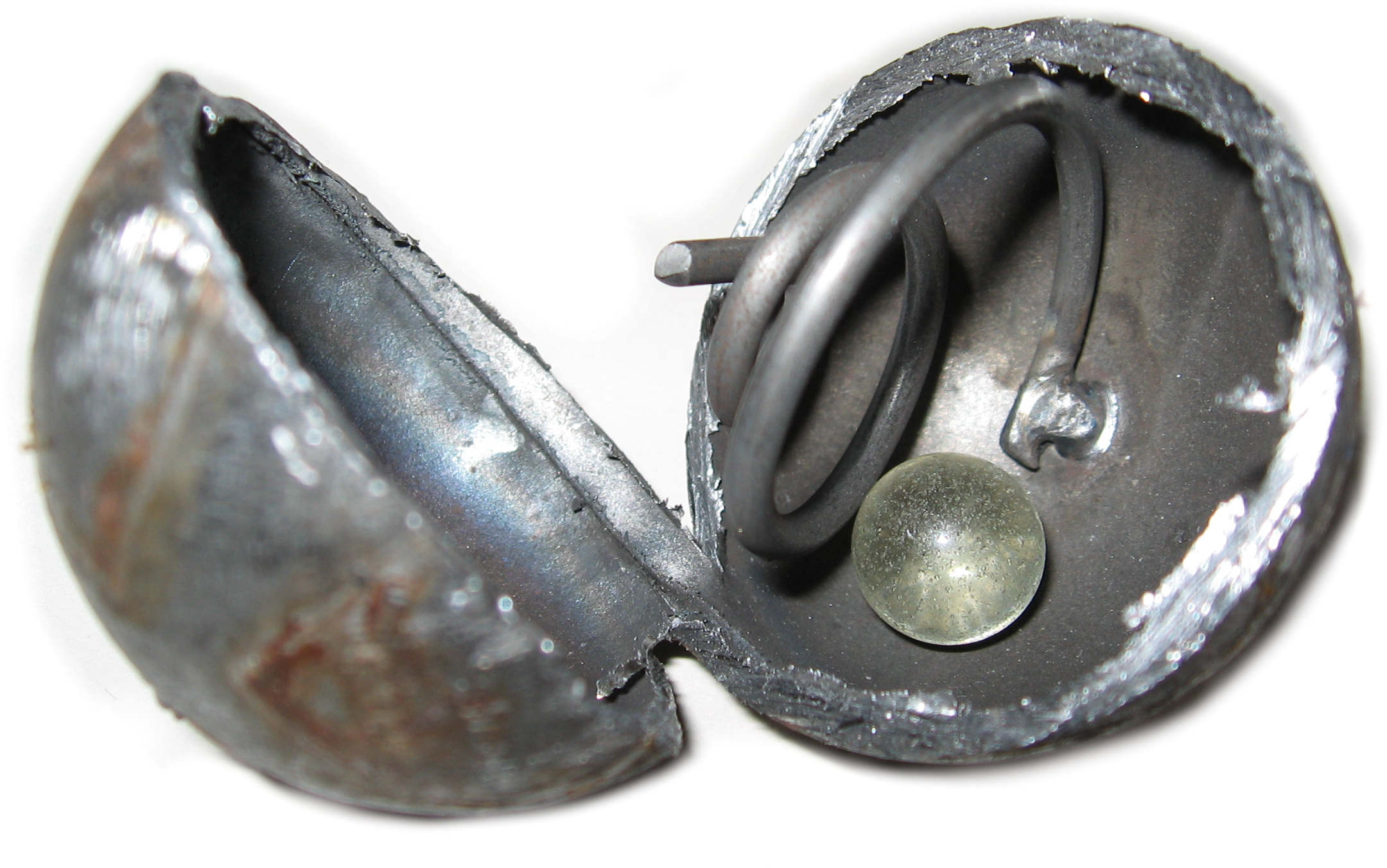 Geoeffnete Klangkugel